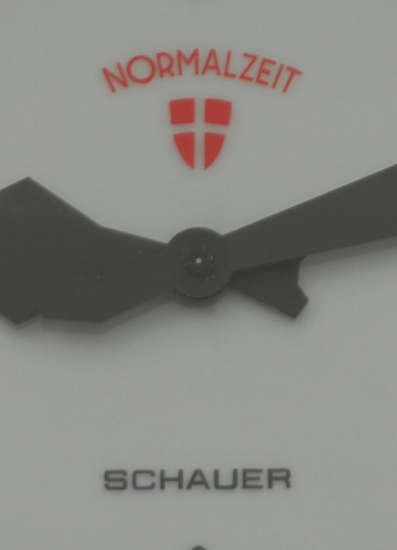 Traditionelle Schrift auf den Zifferblättern der Wiener Würfeluhren: „Normalzeit“, „Schauer“ (Herstellerfirma) und das Wappen der Stadt Wien